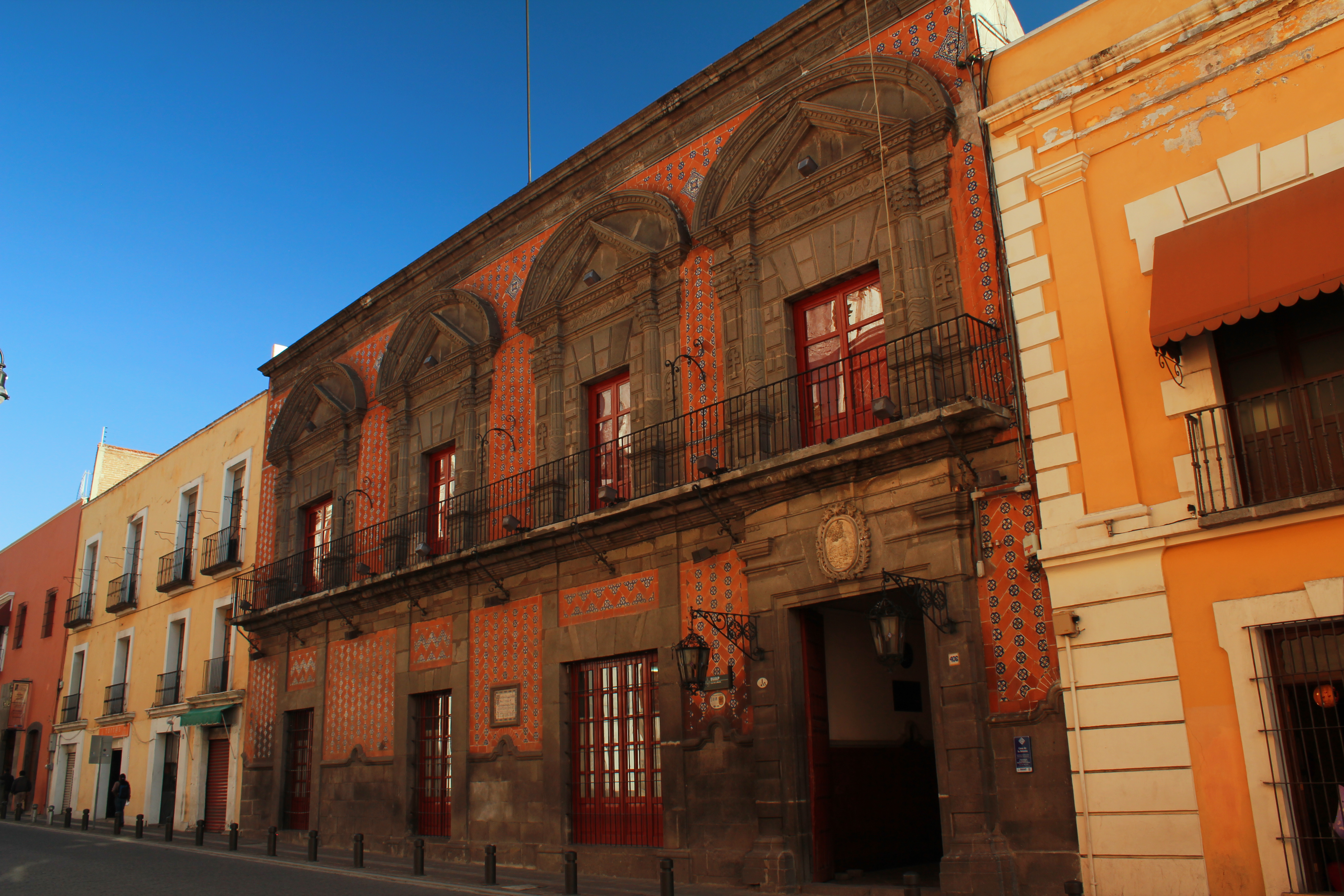 Casa de las Bóvedas Edificio que pertenece a la máxima casa de estudios, no se puede pasar del portón de madera